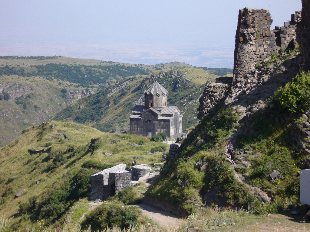 Le monastère d'Amberd